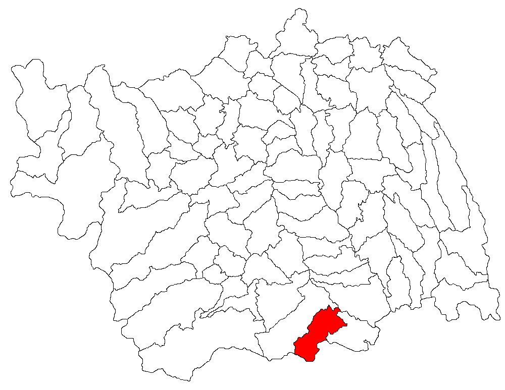 Categorie:Hărţi ale judeţului Bacău